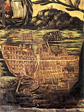 Antica mappa di Alcamo in un dipinto del 1725.